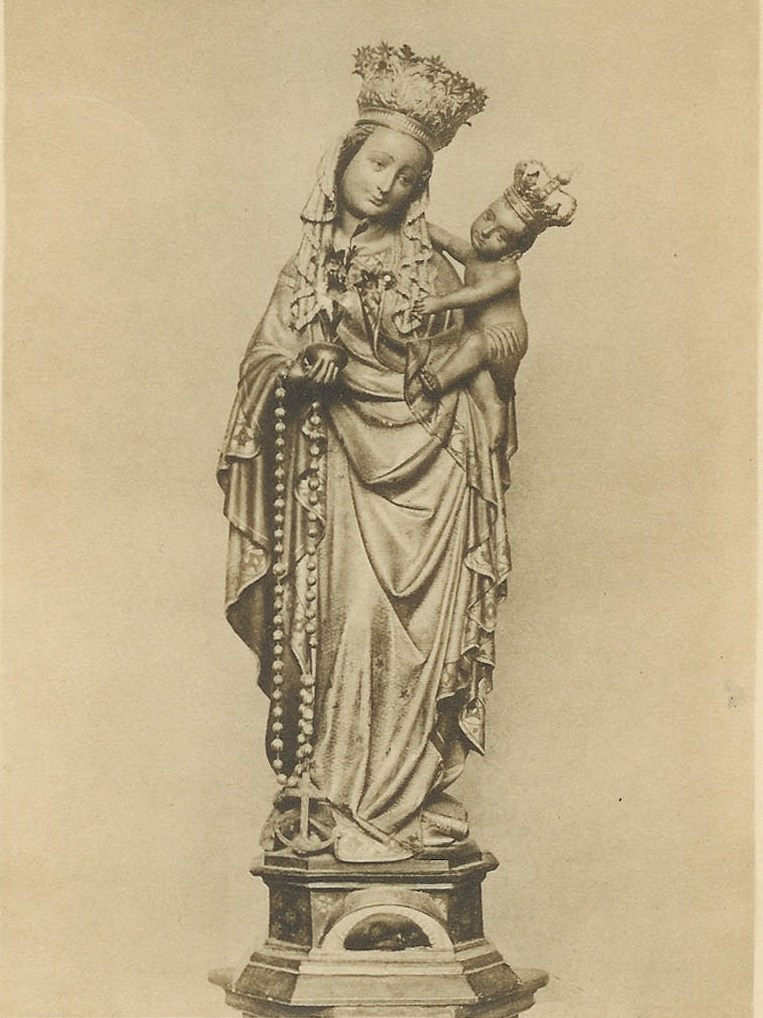 Uit Maria's Heerlijkheid in Nederland van pater Kronenburg ca. 1900